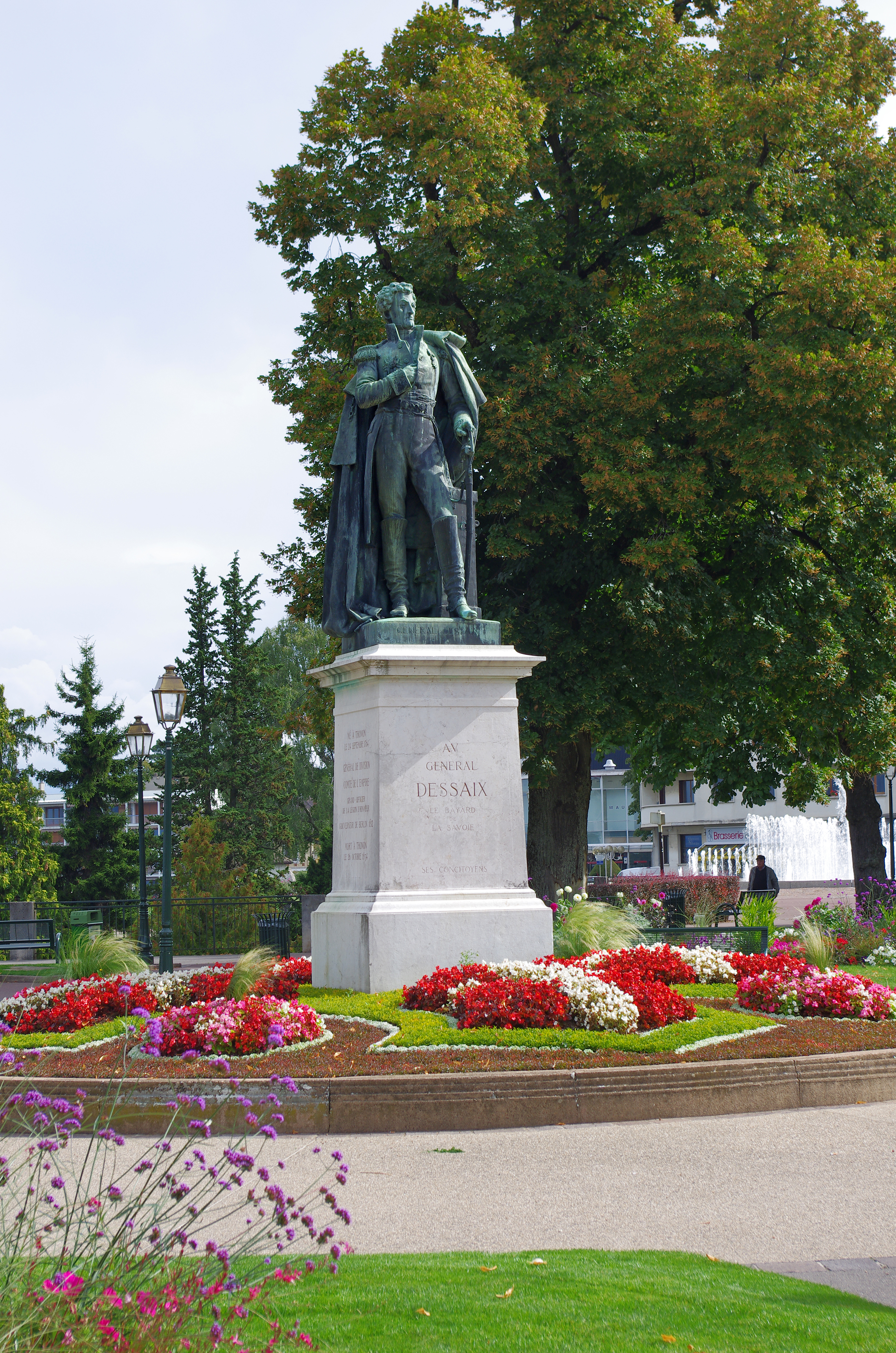 Parc du Belvédère, statue du général Dessaix. Joseph Marie Dessaix est né à Thonon-les-Bains le 24 septembre 1764. Docteur en médecine acquis aux idées de la révolution il deviendra général. Dessaix, plusieurs fois blessé, fut fait prisonnier par les autrichiens à Rivoli, fut échangé et devint député au Conseil des Cinq-Cents. Dessaix conserva son commandement malgré son opposition au 18 brumaire et fut par la suite nommé général de brigade par le Premier consul. Dessaix se rallia à la Monarchie lors de la première Restauration ce qui n'empêcha pas Napoléon de lui donner le commandement de Lyon lors des Cents-Jours. Après la seconde abdication de Napoléon le 7 juillet 1815, il quitta la France pour la Suisse puis le Piémont. Il fut arrêté en 1816 et enfermé dans la forteresse de Fenestrelle pendant 4 mois. La forteresse de Fenestrelle était au royaume de Piémont-Sardaigne depuis 1713. C'était la plus grande forteresse d'Europe. Dessaix fut nommé commandant de la garde nationale de Lyon après la révolution de 1830. Dessaix est mort paisiblement à Thonon le 26 octobre 1834. Son nom figure sur l'Arc de Triomphe. La statue a été financée par souscription publique et inaugurée le 6 septembre 1910 par le président Fallières à l'occasion du cinquantième anniversaire de l'annexion de la Savoie à la France.